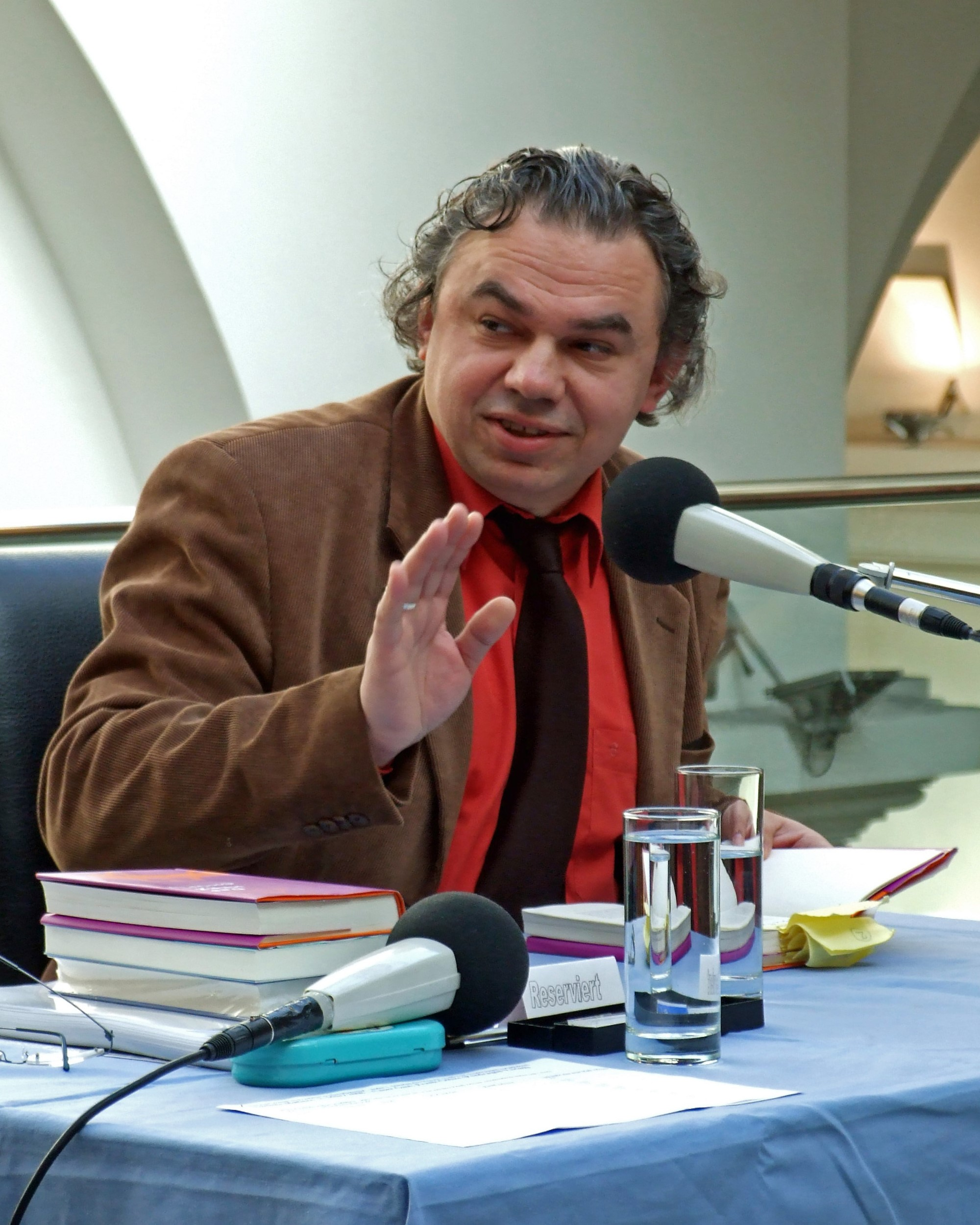 Artur Becker während einer öffentlichen Lesung in Ffm